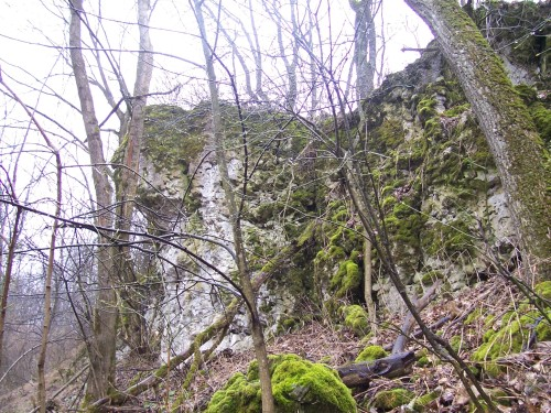 Скали неподалік гори Богит, Медобори